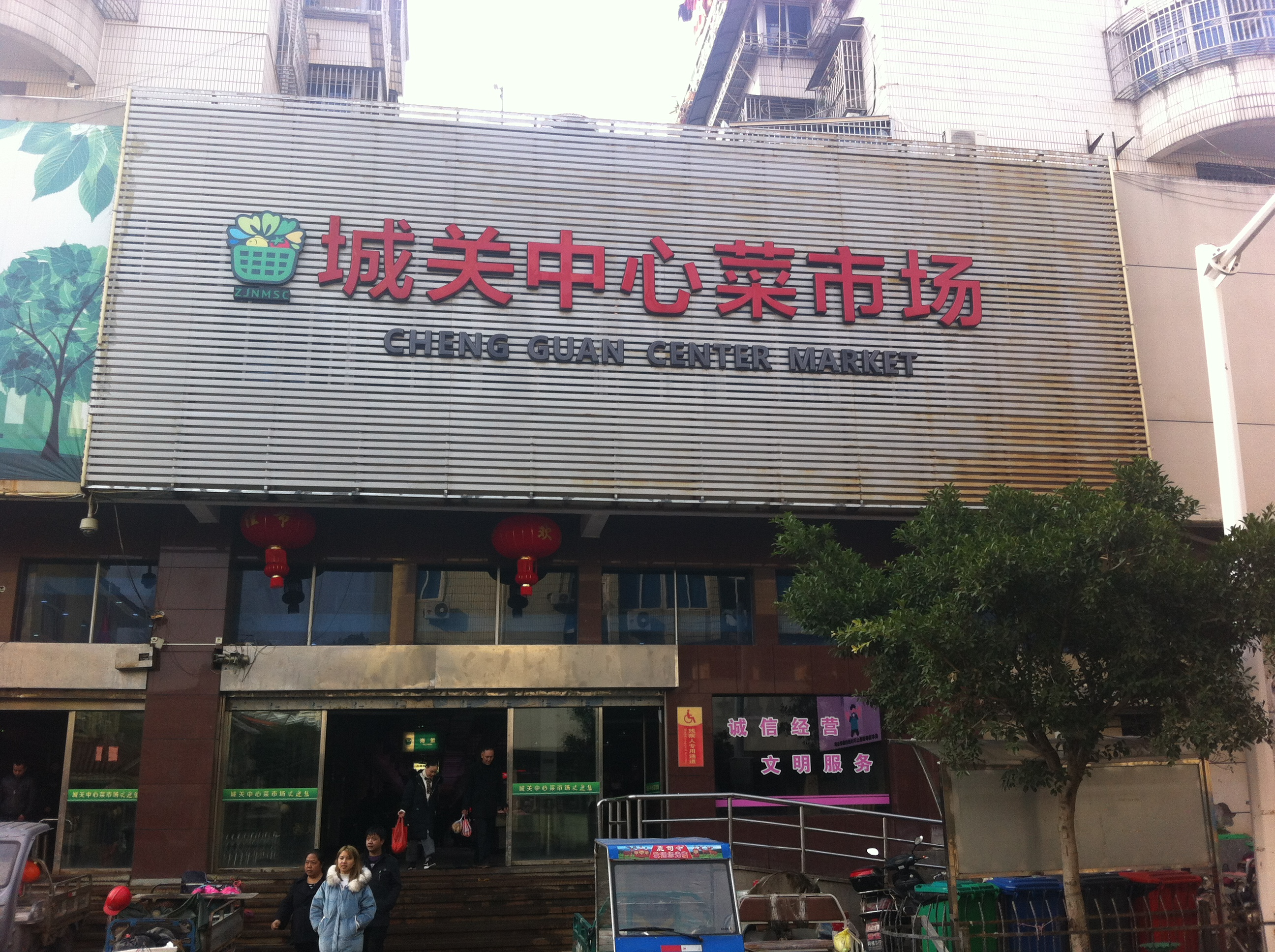 中文（中国大陆）: 玉环城关中心菜市场